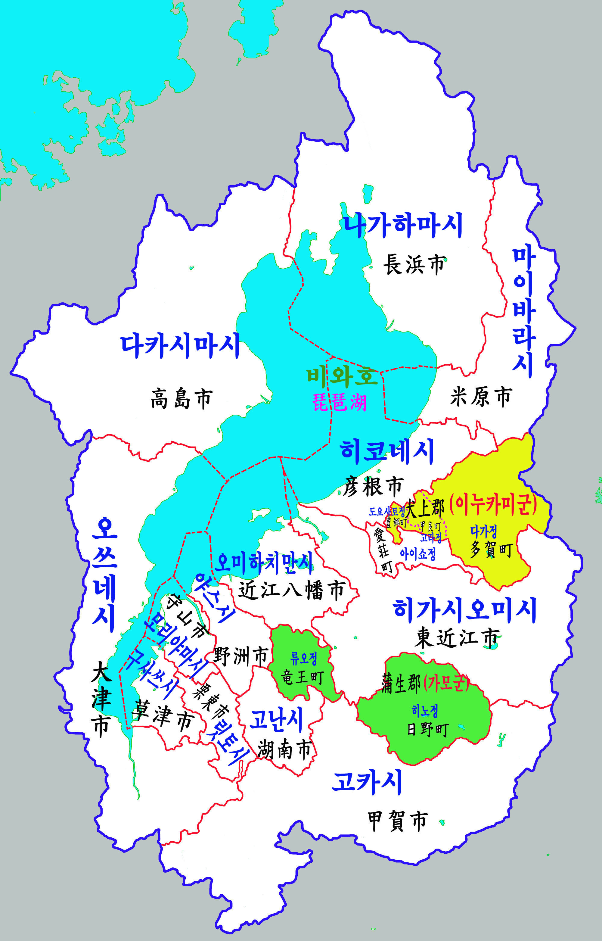 시가현 행정구역